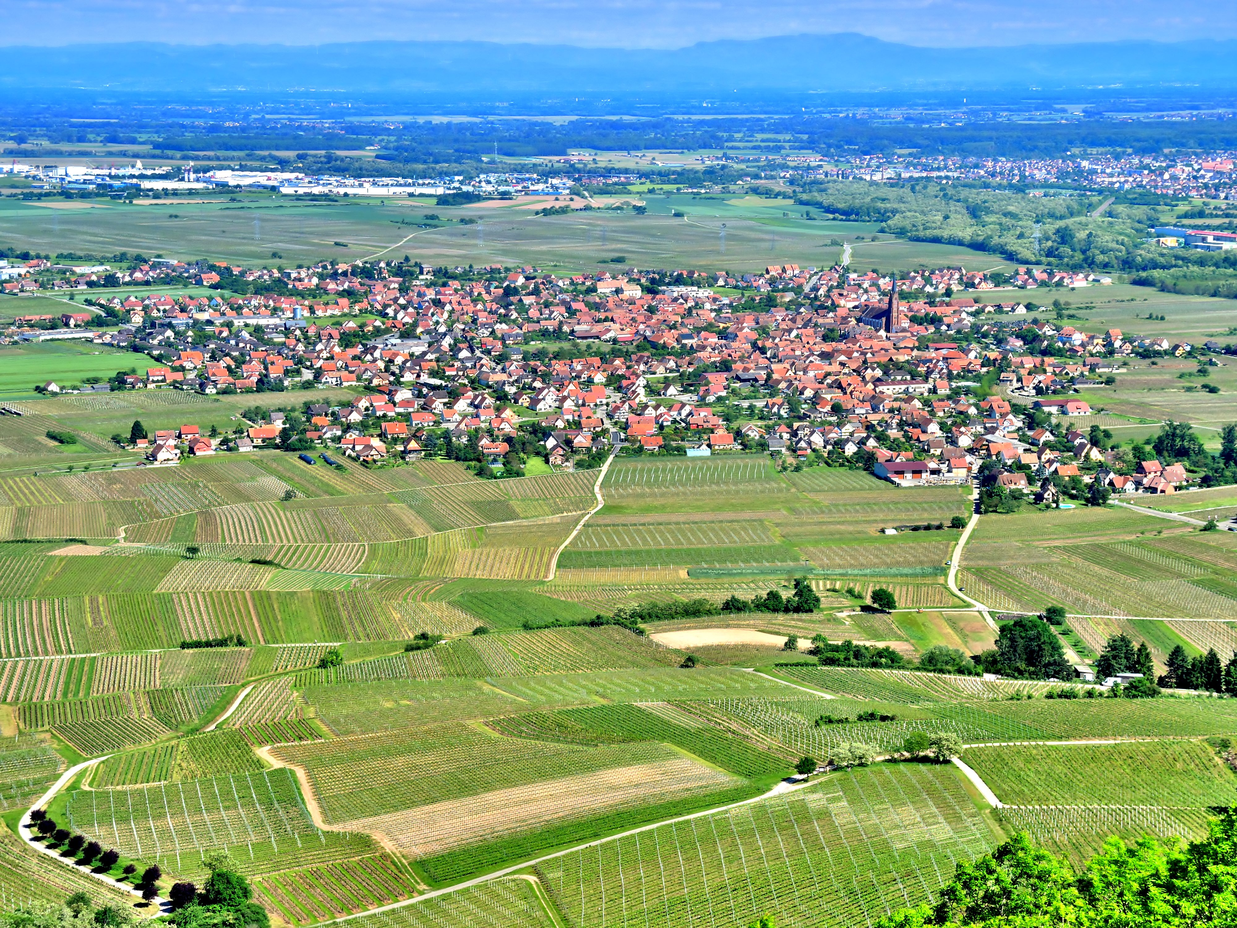 Le village de Scherwiller, vu des ruines du château de l'Ortenbourg. Bas-Rhin